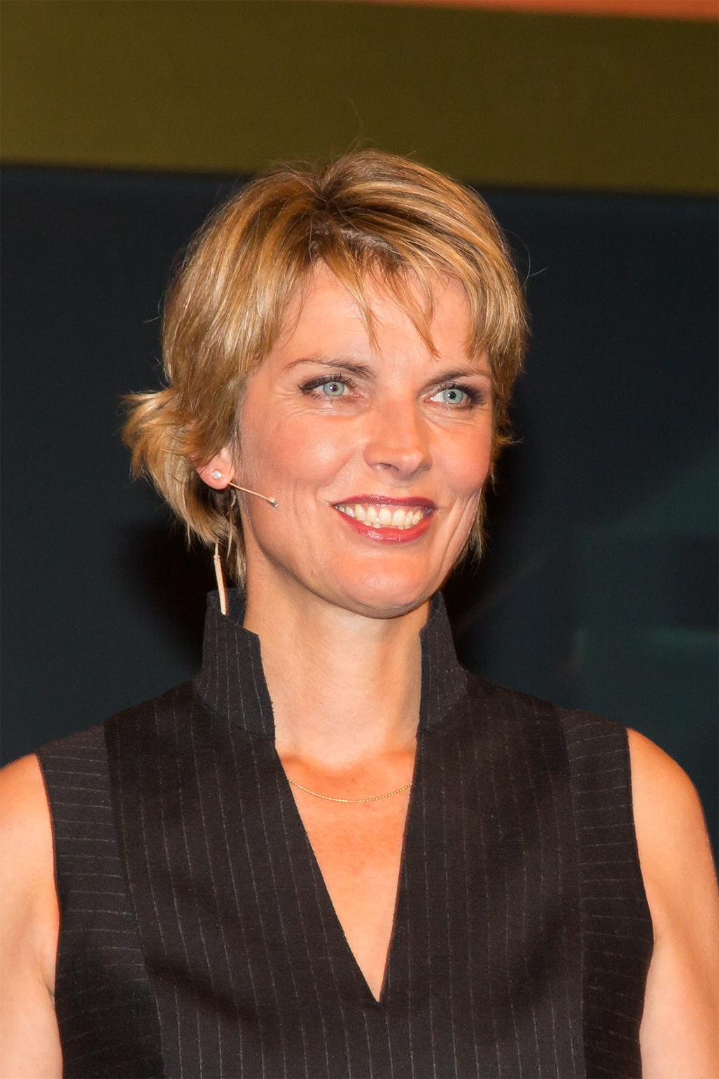 Verleihung des Hanns-Joachim-Friedrichs-Preises 2015 in Köln: Preisträgerin Marietta Slomka